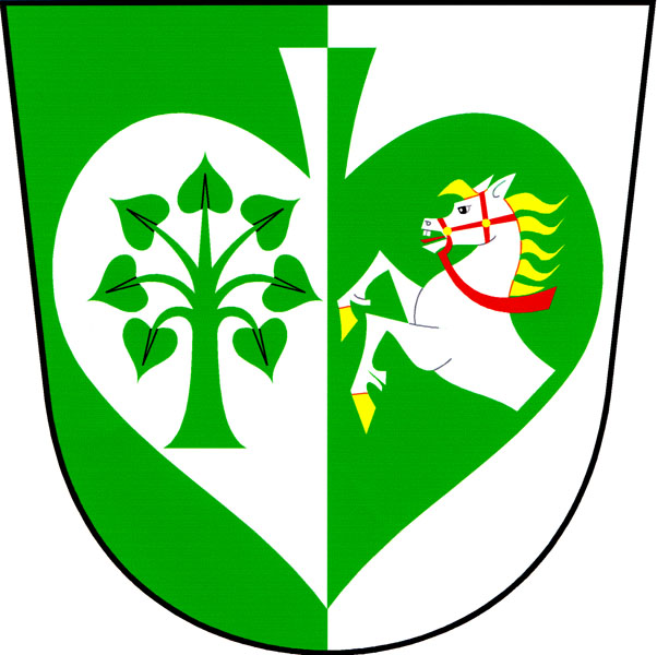 Znak obce Pokřikov.